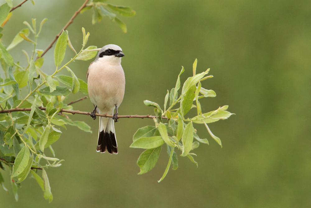 Neuntöter in der Nähe des Ilkerbruchs